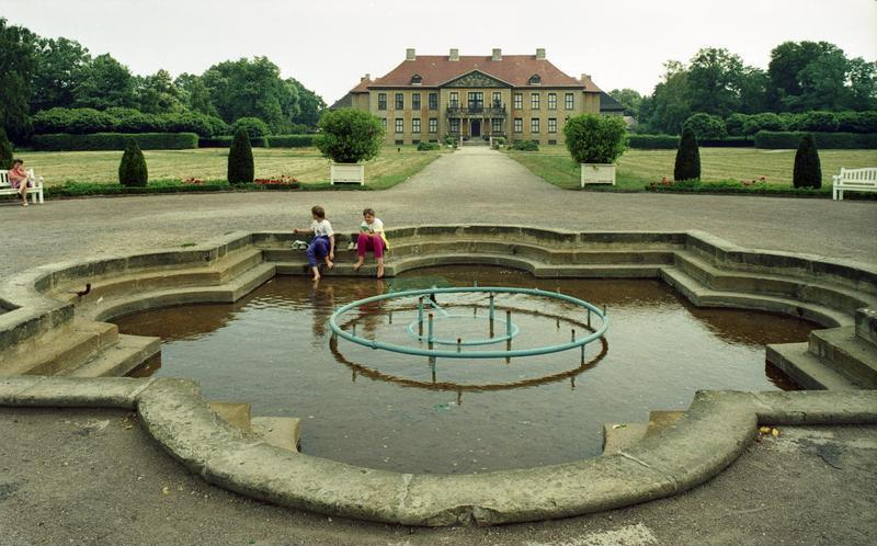 11.-18.8.1991 Bundesland Sachsen-Anhalt, Oranienbaum Park und Schloß